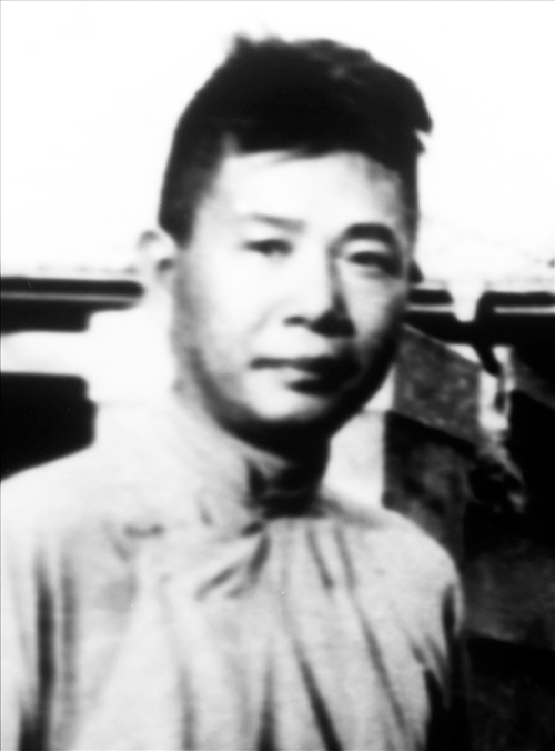 余家菊？